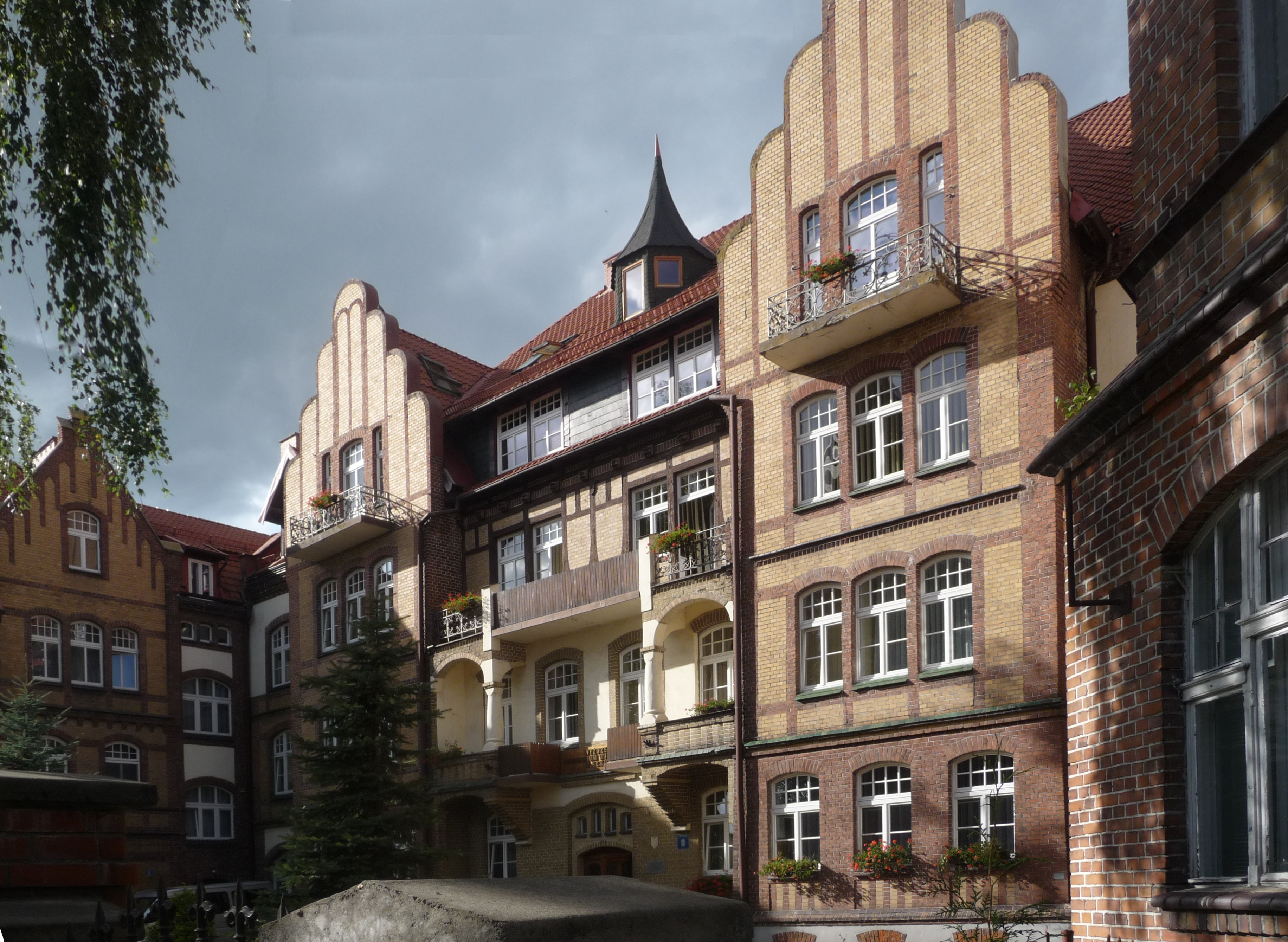 Ełk, ul. Kościuszki 9 - budynek Wyższego Seminarium Duchownego (zabytek nr A-3703)